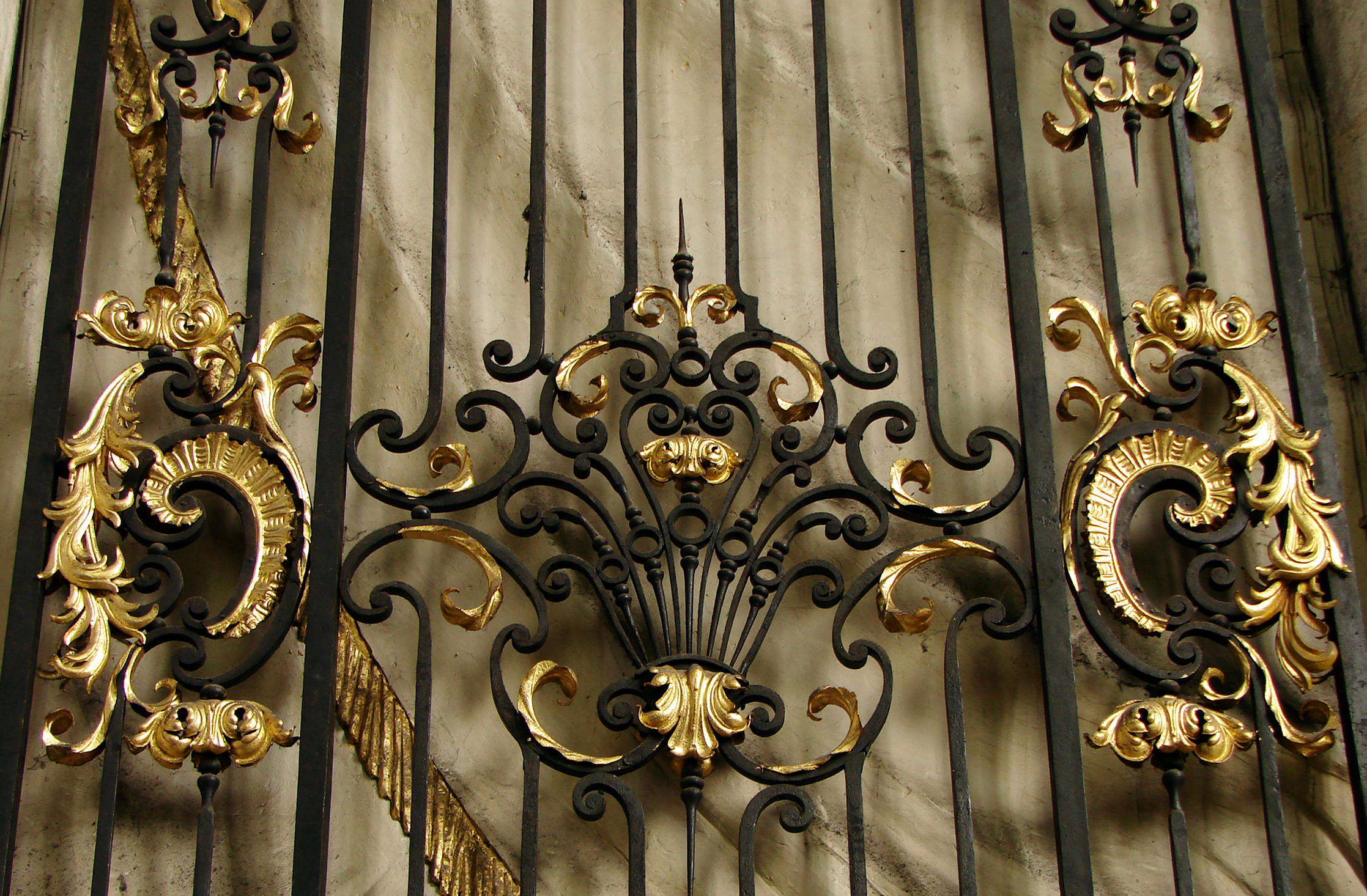 Grilles du choeur de la cathédrale d'Amiens par Jean Veyren, 18ème siècle; détail.